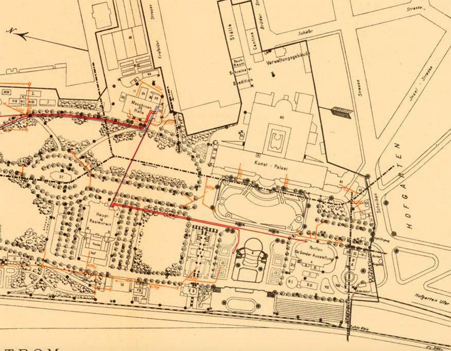 Karte Ausschnitt Internationale Kunstausstellung, Kunsthistorische Ausstellung, Grosse Gartenbau-Ausstellung, Düsseldorf 1904; Nr. 40 Kunst-Palast, Nr. 41 Restaurant Schievelbusch "Zum Kunst-Palast" (heute Ehrenhof 3)